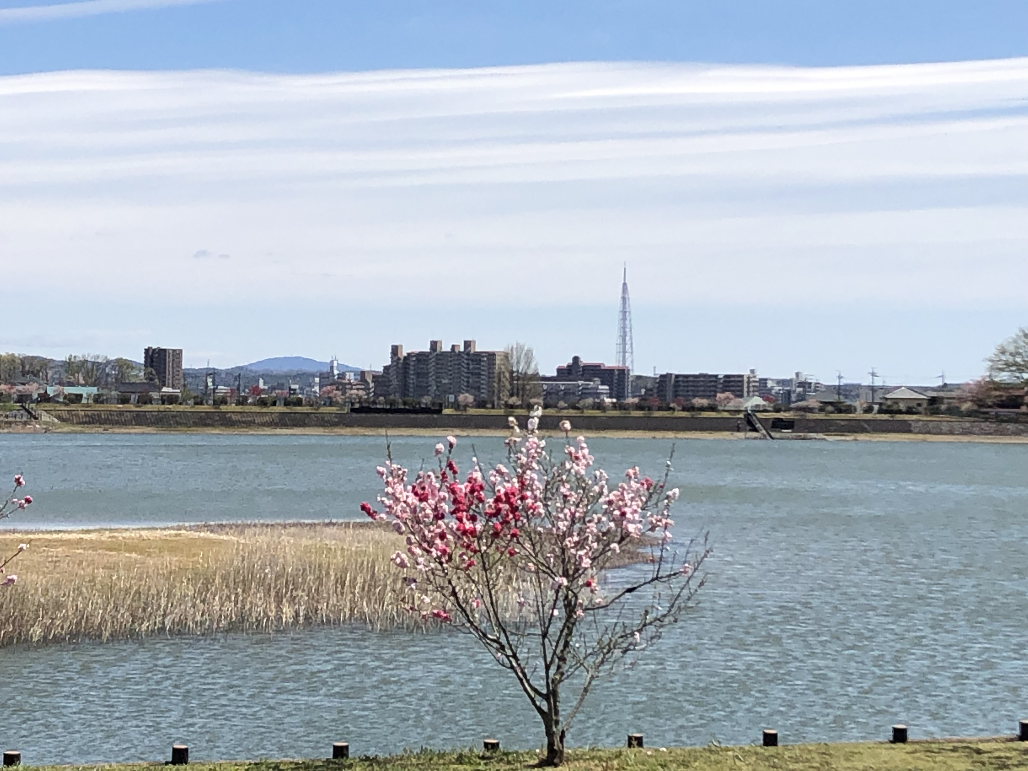 維摩池 〔いまいけ〕。愛知県尾張旭市新居町。